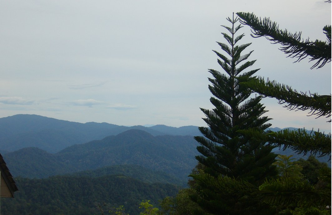 中文（马来西亚）: 这是从福隆港往远处眺望的照片，可以看到森林和远处的山脉。